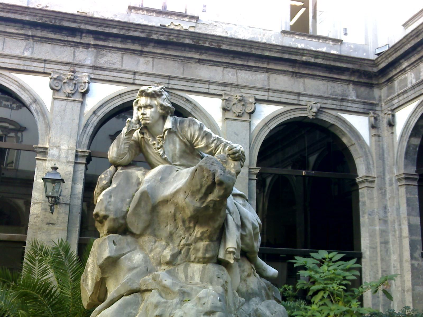 Statua di Beethoven all'interno del chiostro del conservatorio di san Pietro a Majella (Napoli). Opera di Francesco Jerace del 1895